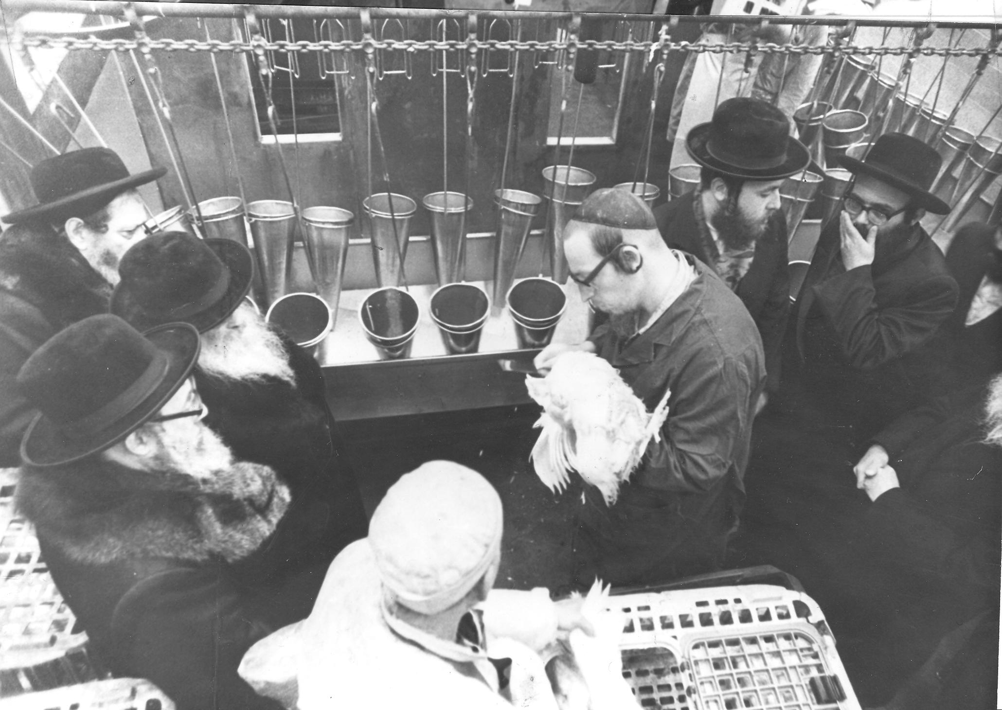 השחיטה הראשונה של בד"ץ מחזיקי הדת ניראים אב"ד נאראל לידו אבד פרעמיסלא הגרשז רוט אבד איהל מאחור נראה הגר"מ שובקס חבר הב